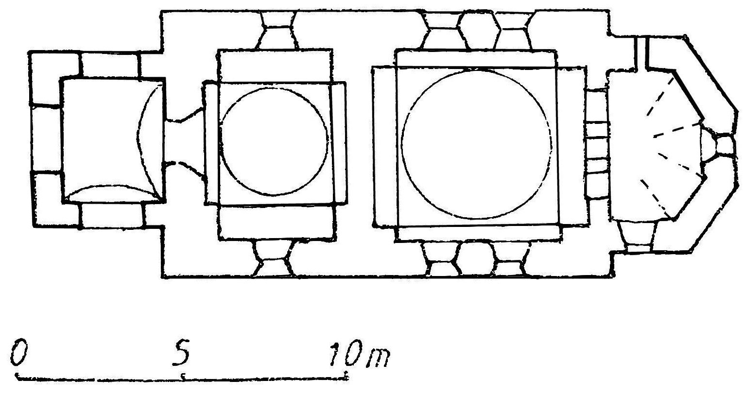 Planul bisericii din satul Voivodenii Mici (sursă: adaptare după Valeriu Literat, Biserici vechi românești din Țara Oltului)